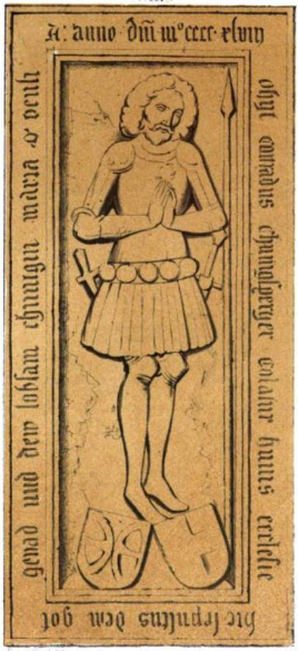 Konrad von Königsberg